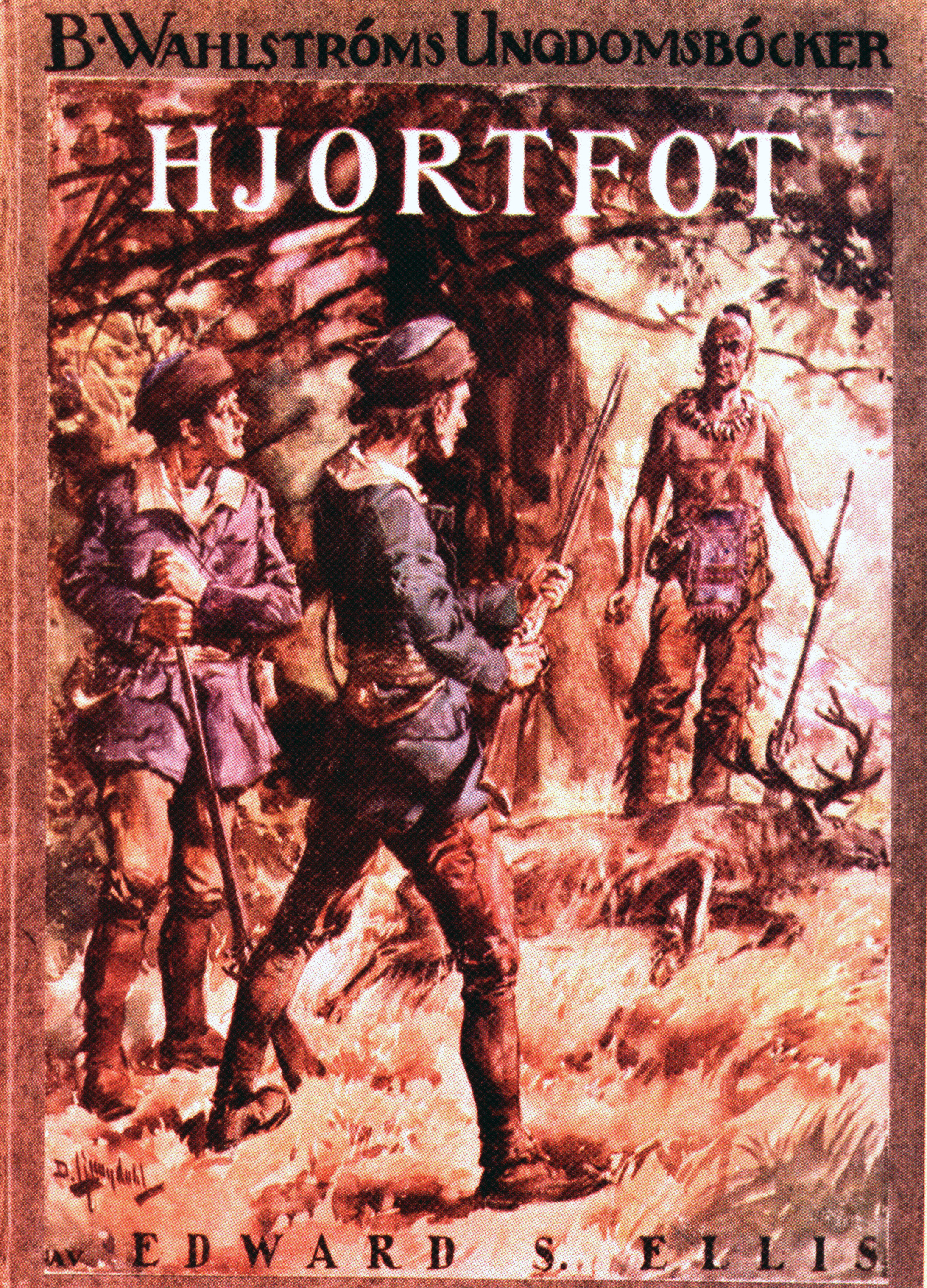 Book cover by David Ljungdahl (1870-1940): Hjortfot